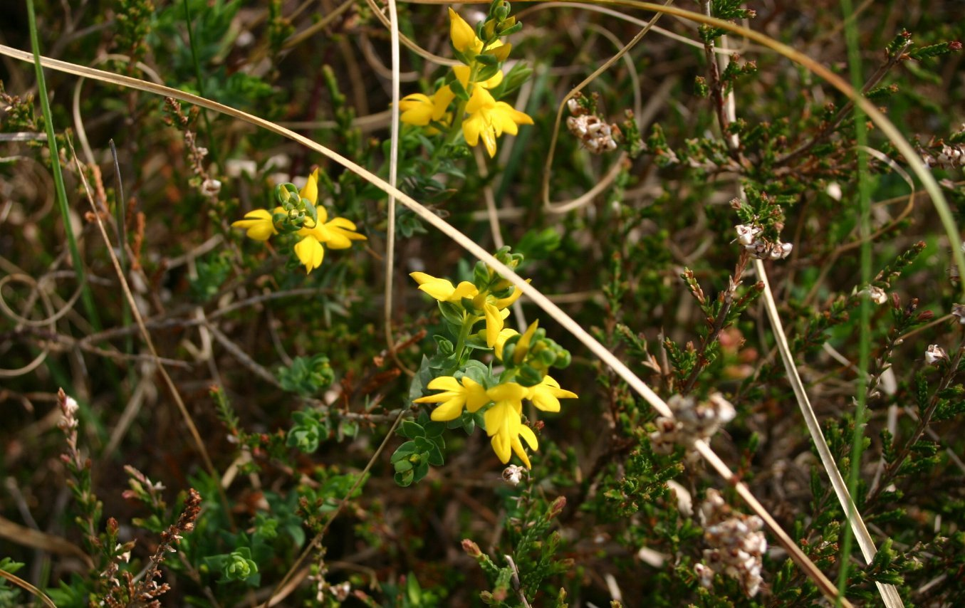 Genista anglica subsp. anglica: Habit.